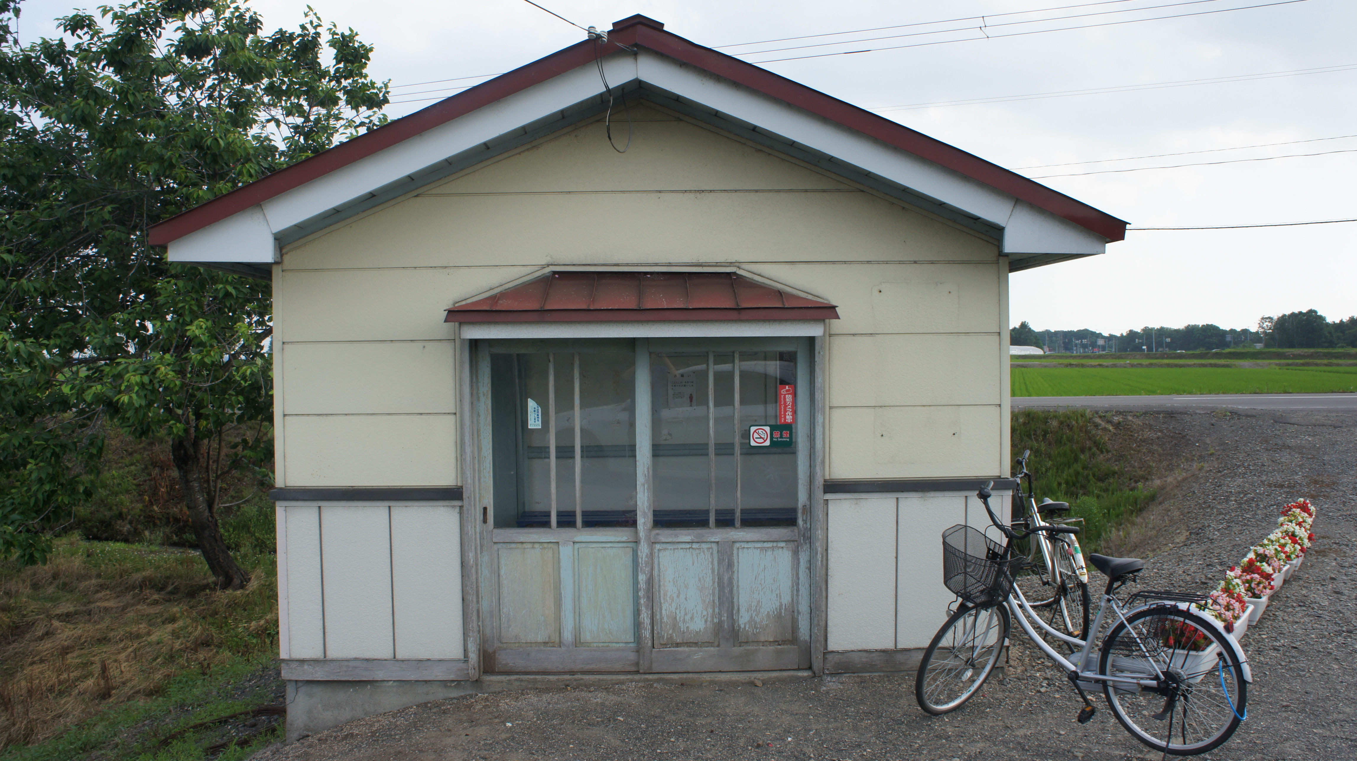 JR札沼線・知来乙駅の待合室 Sony NEX-3